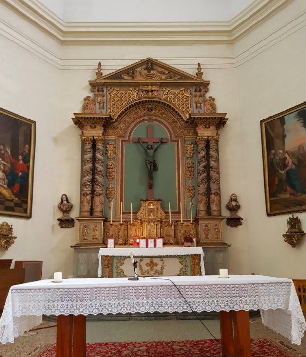 Maître autel servant au culte catholique